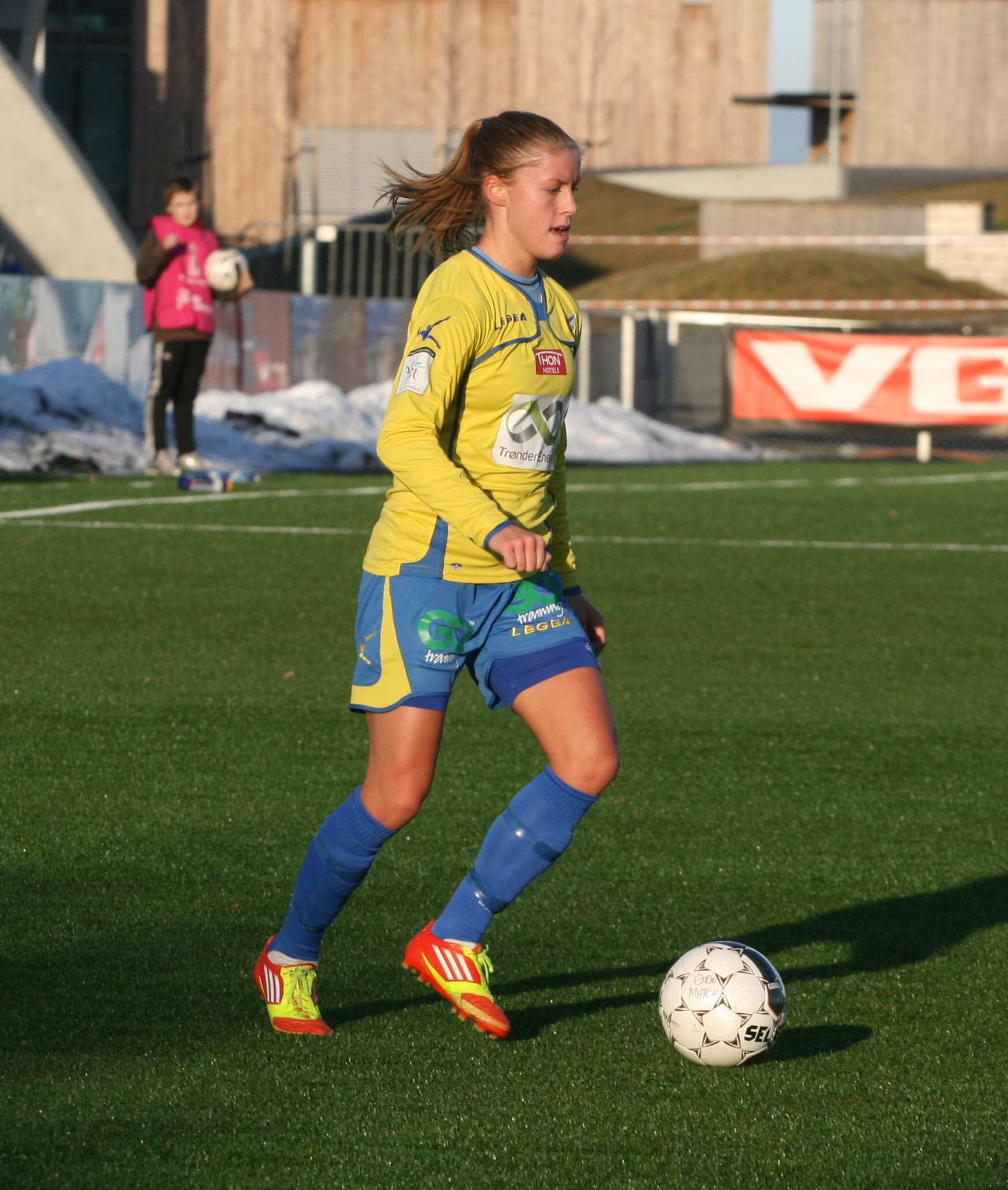 Fotballspilleren Martine Flakk